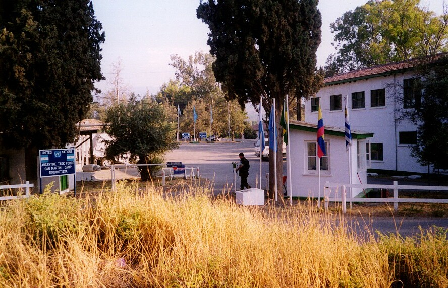 Skouriotissa. Campo ocupado por el contingente argentino en UNFICYP. Frente. Imagen tomada por el cargador. Año 1998.